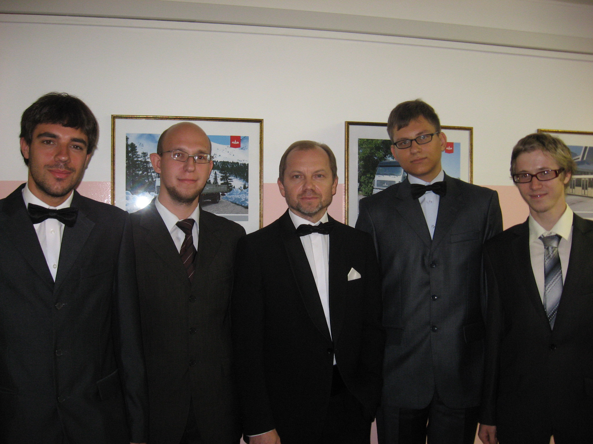 Алексей Лойко (крайний справа) с командой и олимпийским чемпионом Сергеем Мартыновым на съёмаках